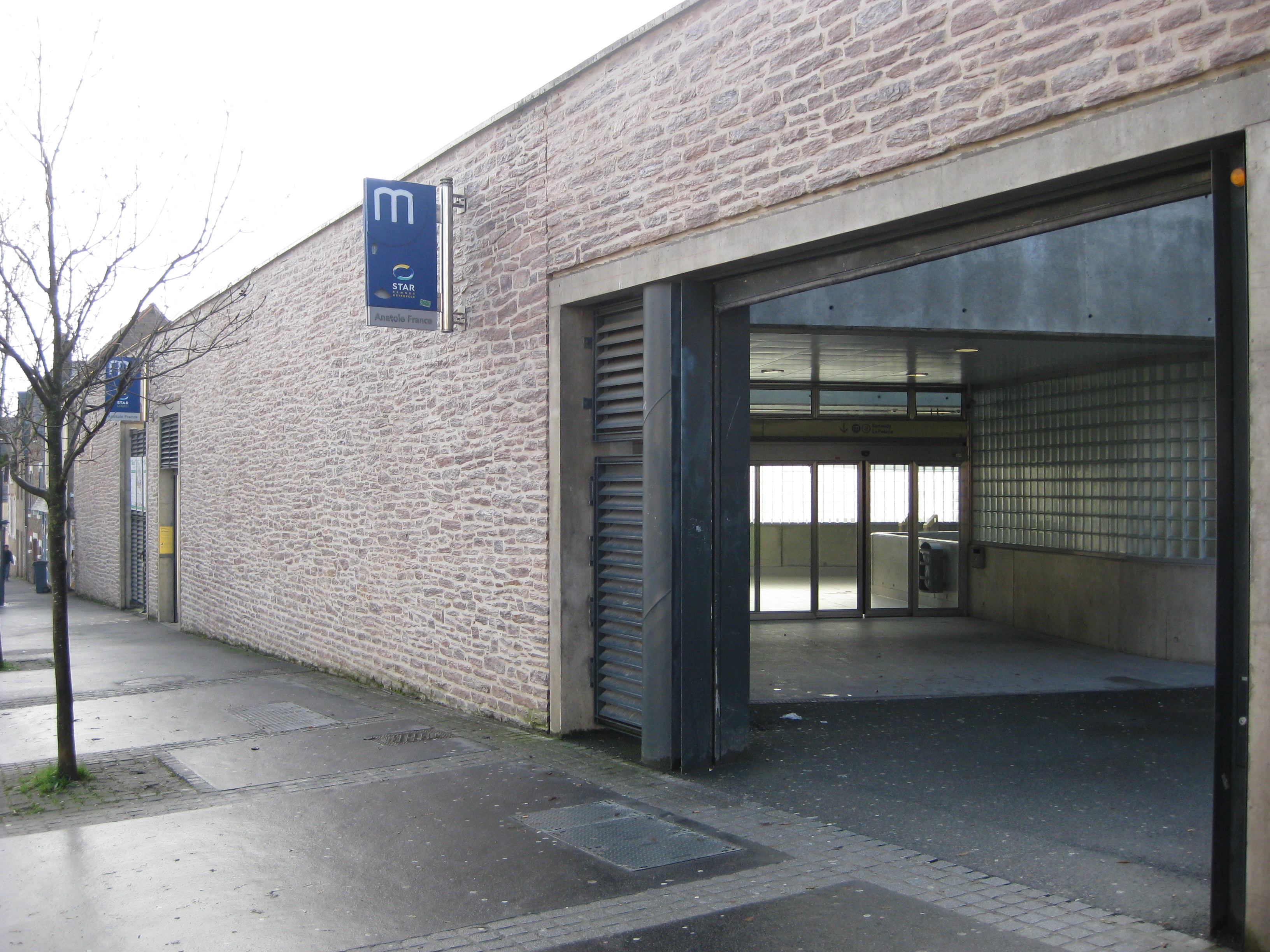 Entrée de la station de métro Anatole France à Rennes